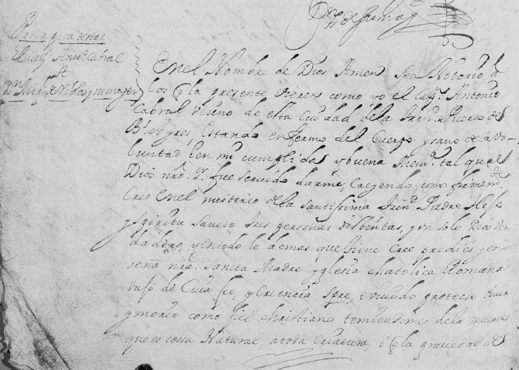 poder para testar del Capitán Antonio Cabral de Melo al Capitán Miguel de Riglos.